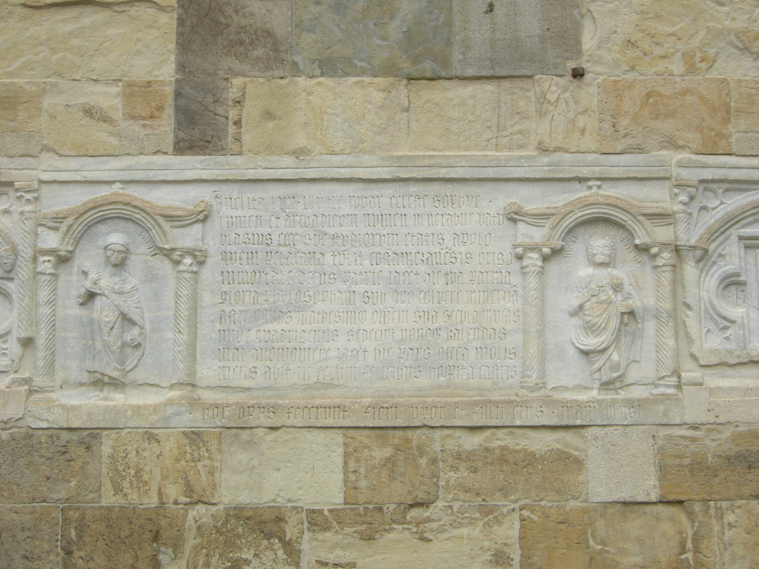 Duomo di parma, facciata, tomba